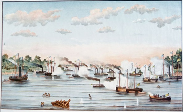 Passagem de Curupaity.